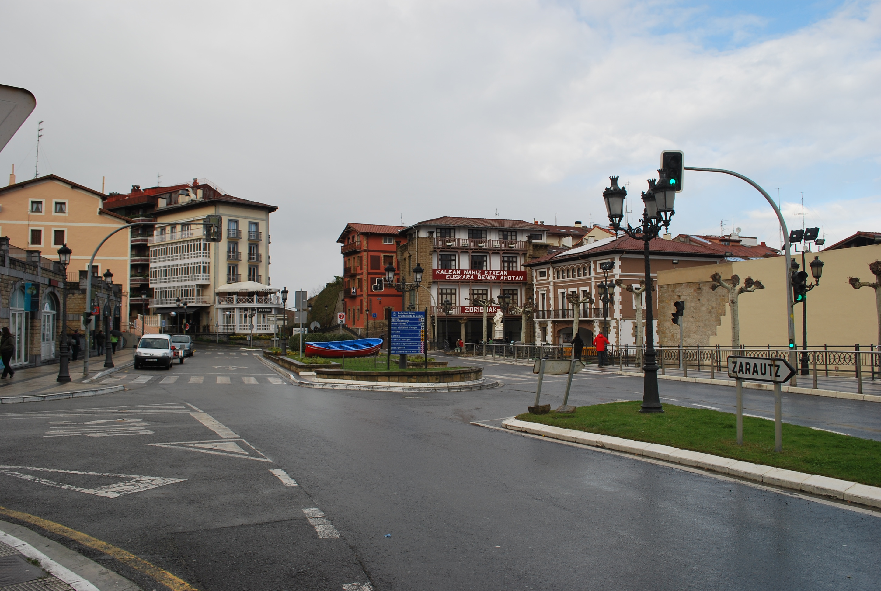 Rue principale (route de Zarautz) à Getaria (Guipuscoa).